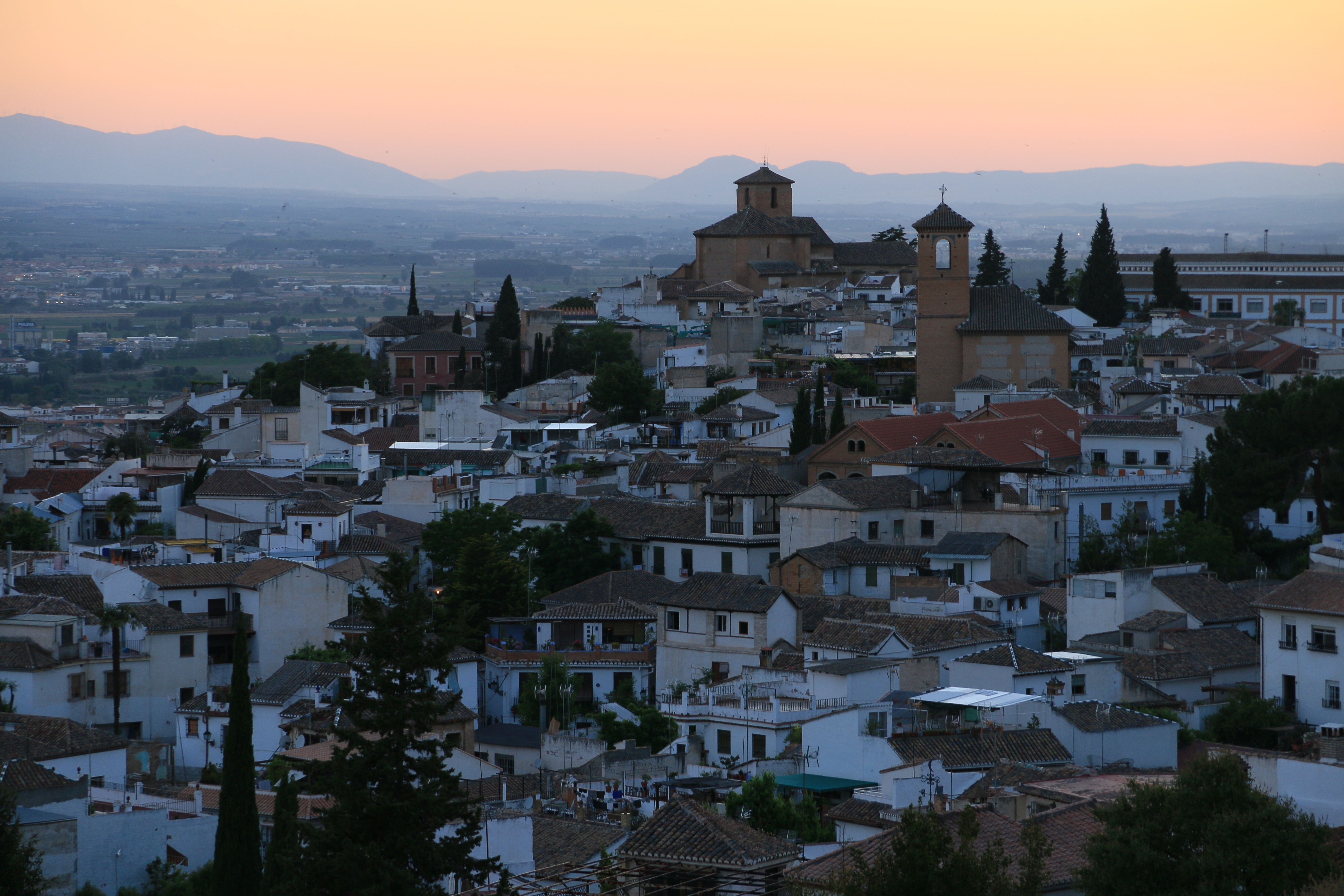 Kulturturistens Nirvana.